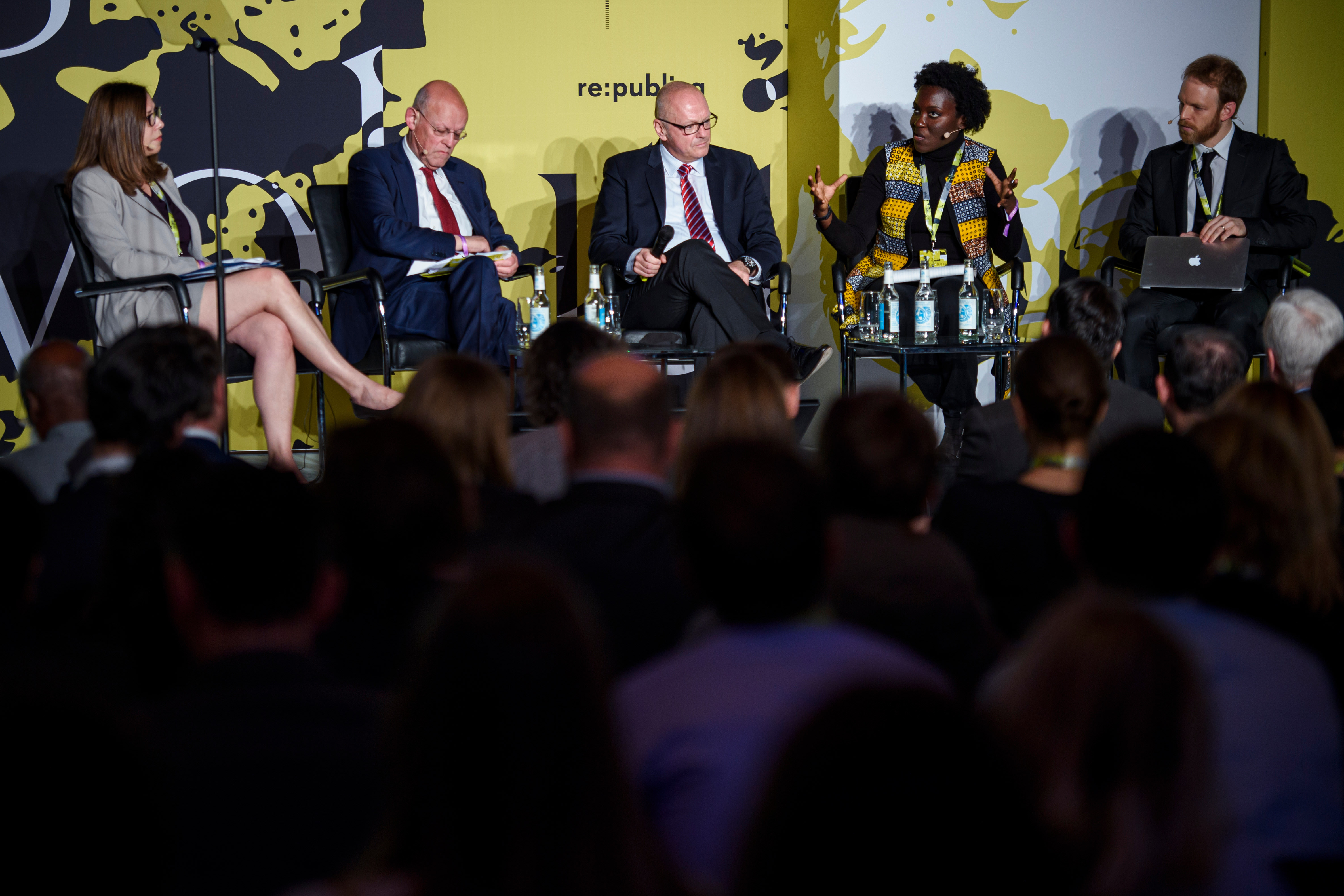 Laura Rosenberger, Uri Rosenthal, Andreas Michaelis, Nanjala Nyabola, Oliver della Costa Stuenkel